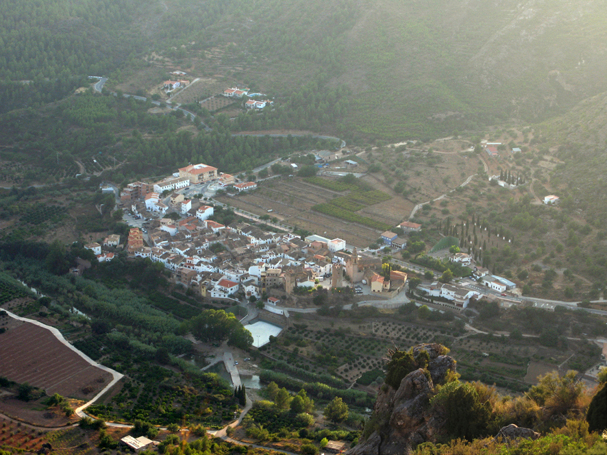 Argelita